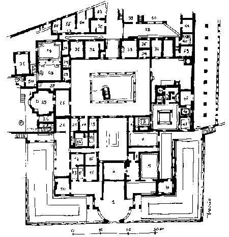 Pianta della Villa dei Misteri